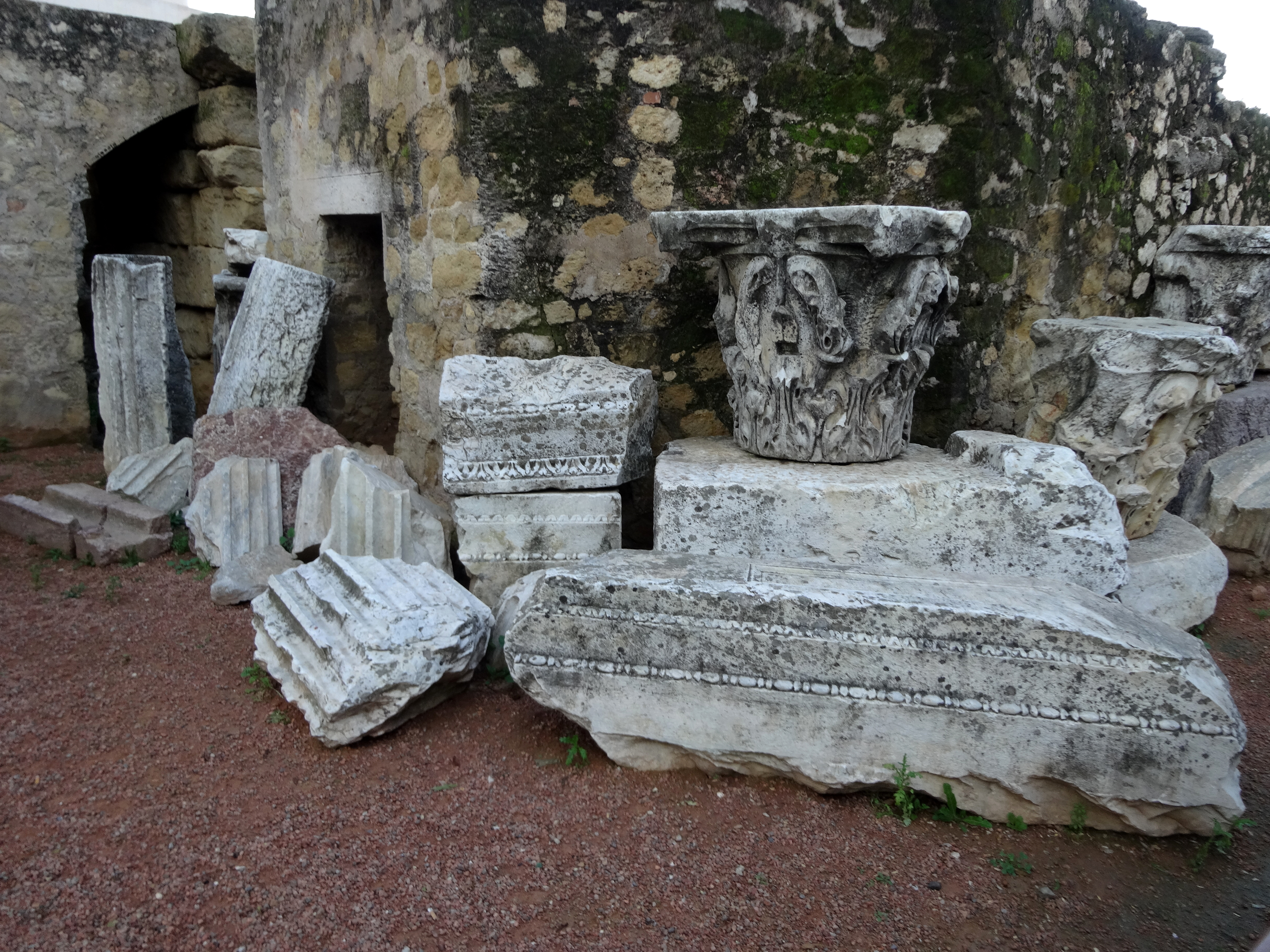 Templo romano de Córdoba (España).